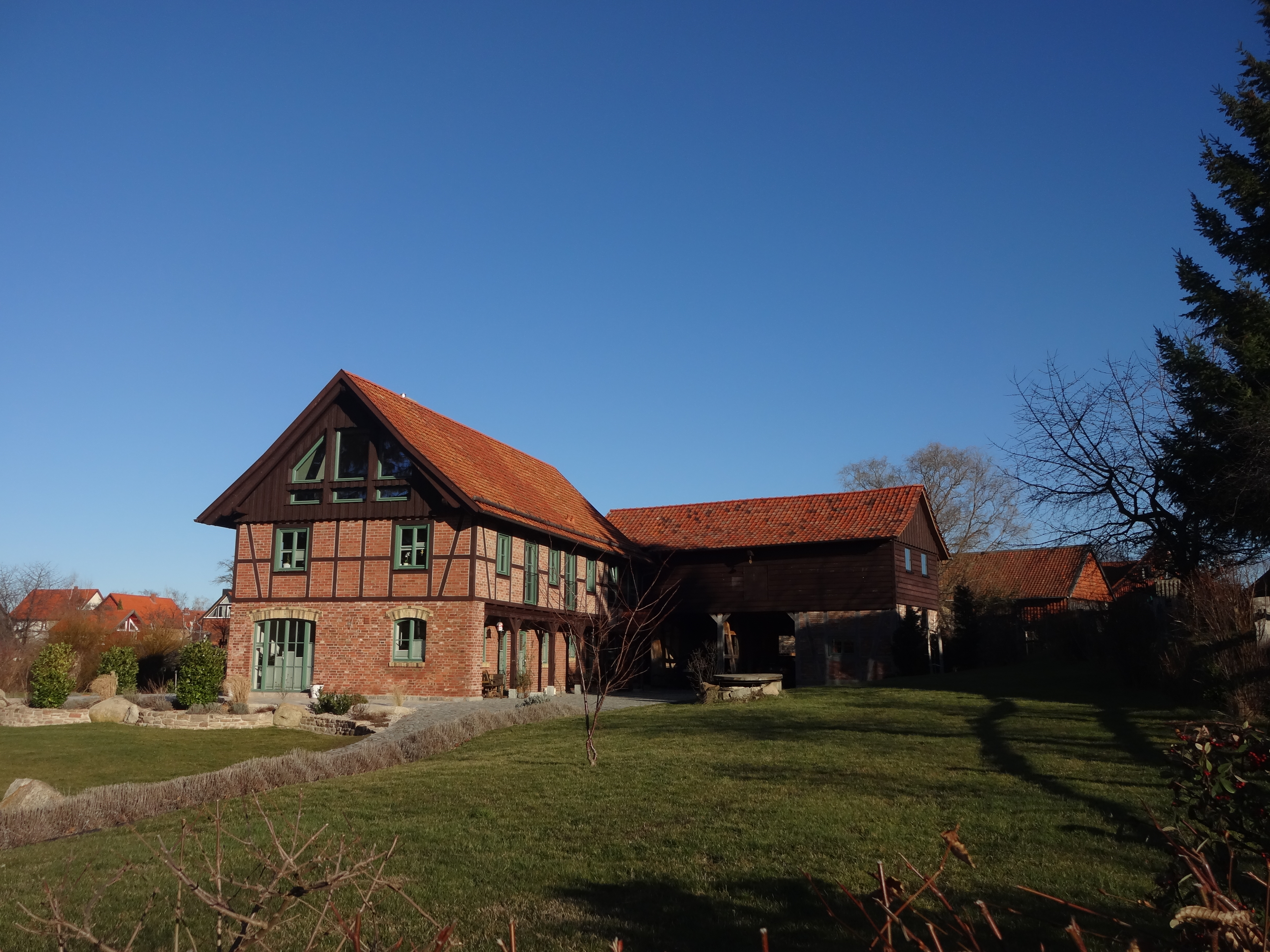 ehemals denkmalgeschütztes Wohnhaus in der Dorfstraße 19 in Darlingerode